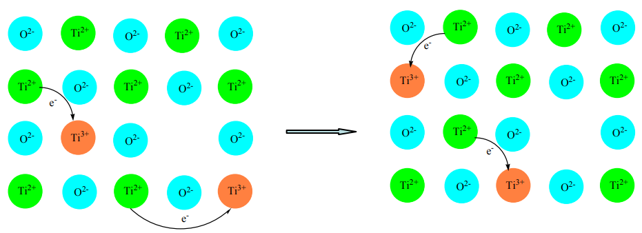 Solido ez estekiometrikoa